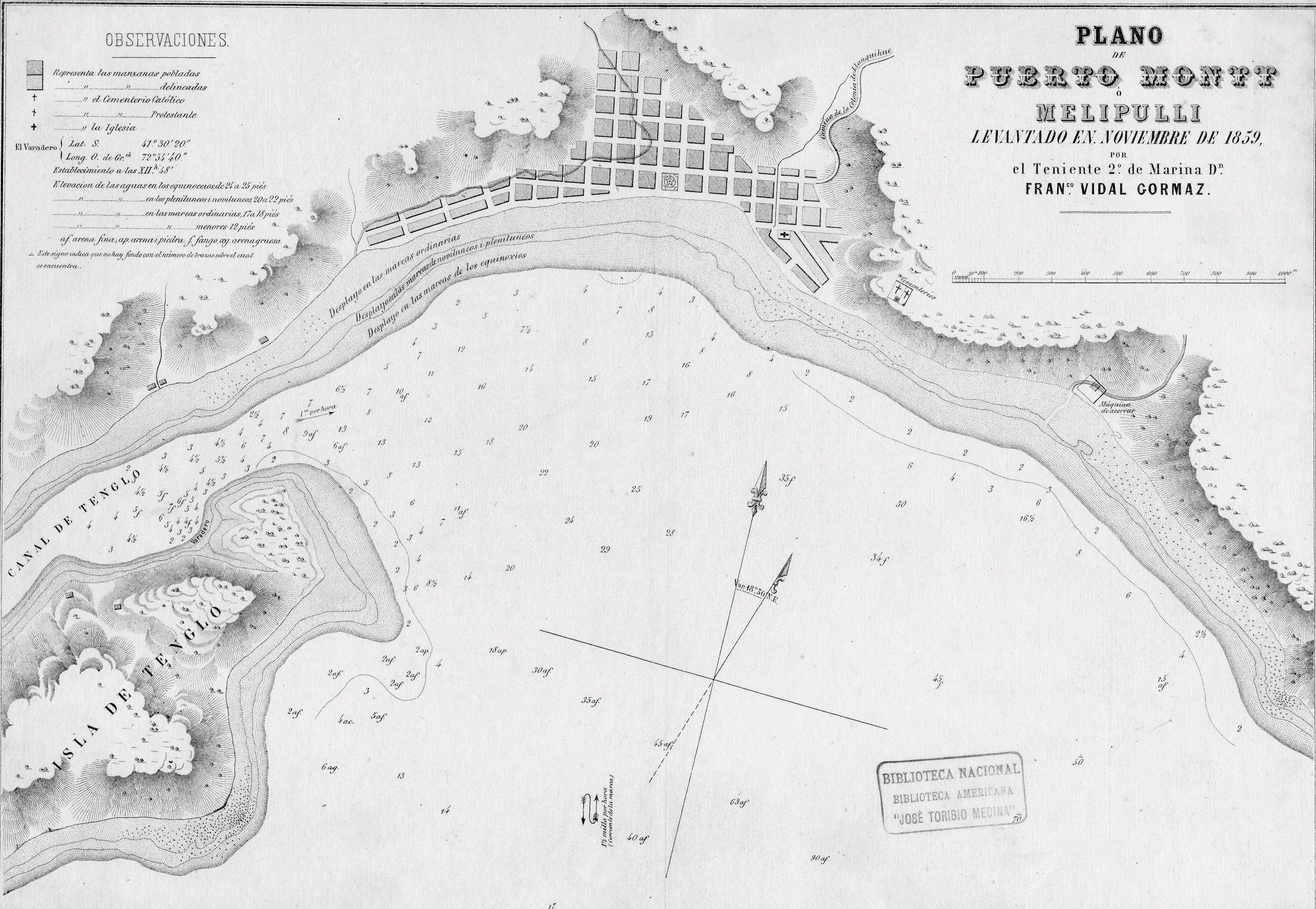 Plano de Puerto Montt, Melipulli, levantado en noviembre de 1859